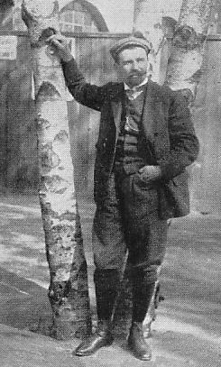 Paul Guignard, französischer Radrennfahrer